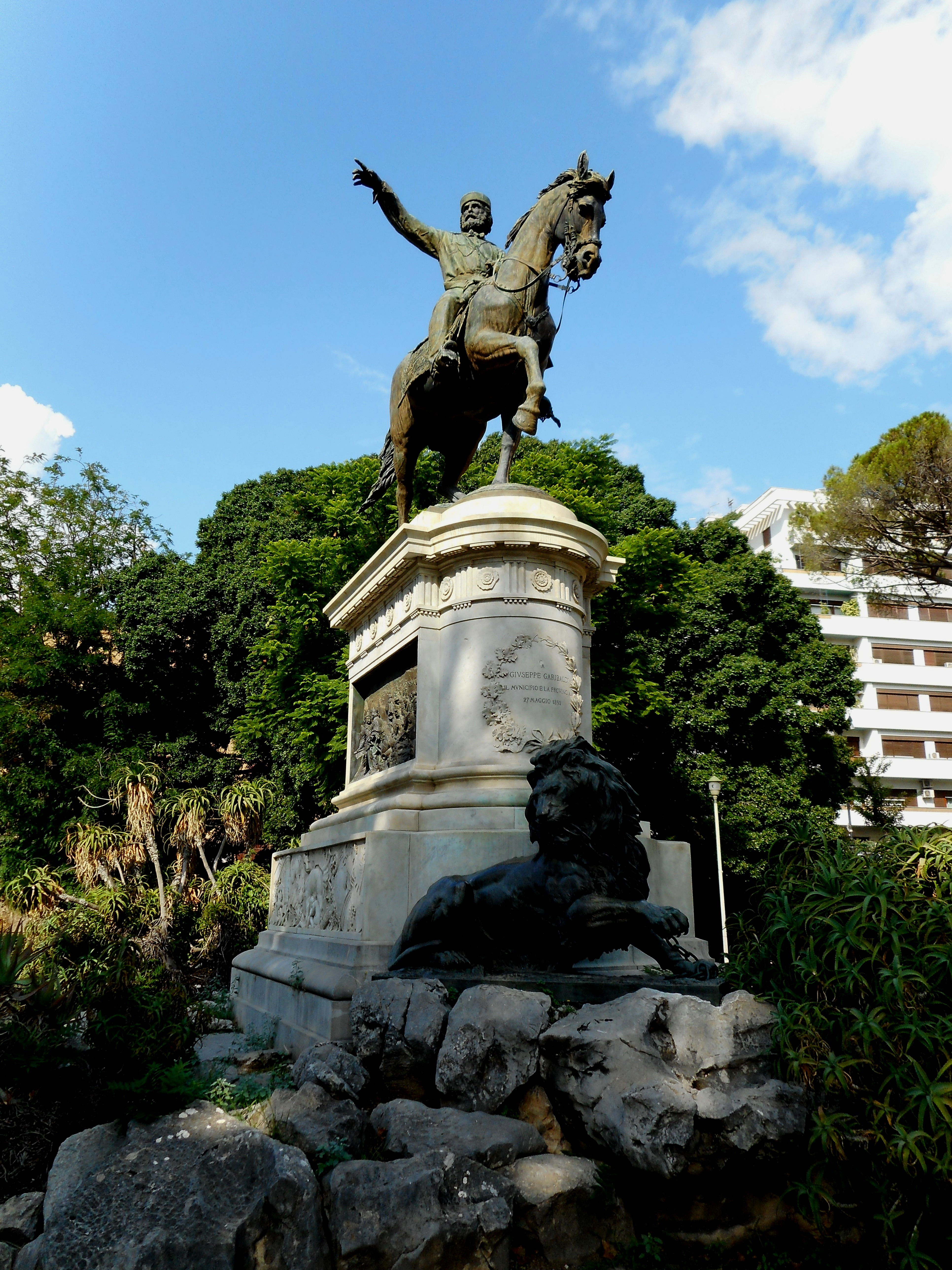 Monumento equestre di Giuseppe Garibaldi nella Villa Falcone-Morvillo